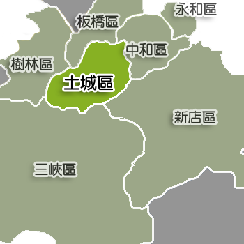 土城區相對位置。